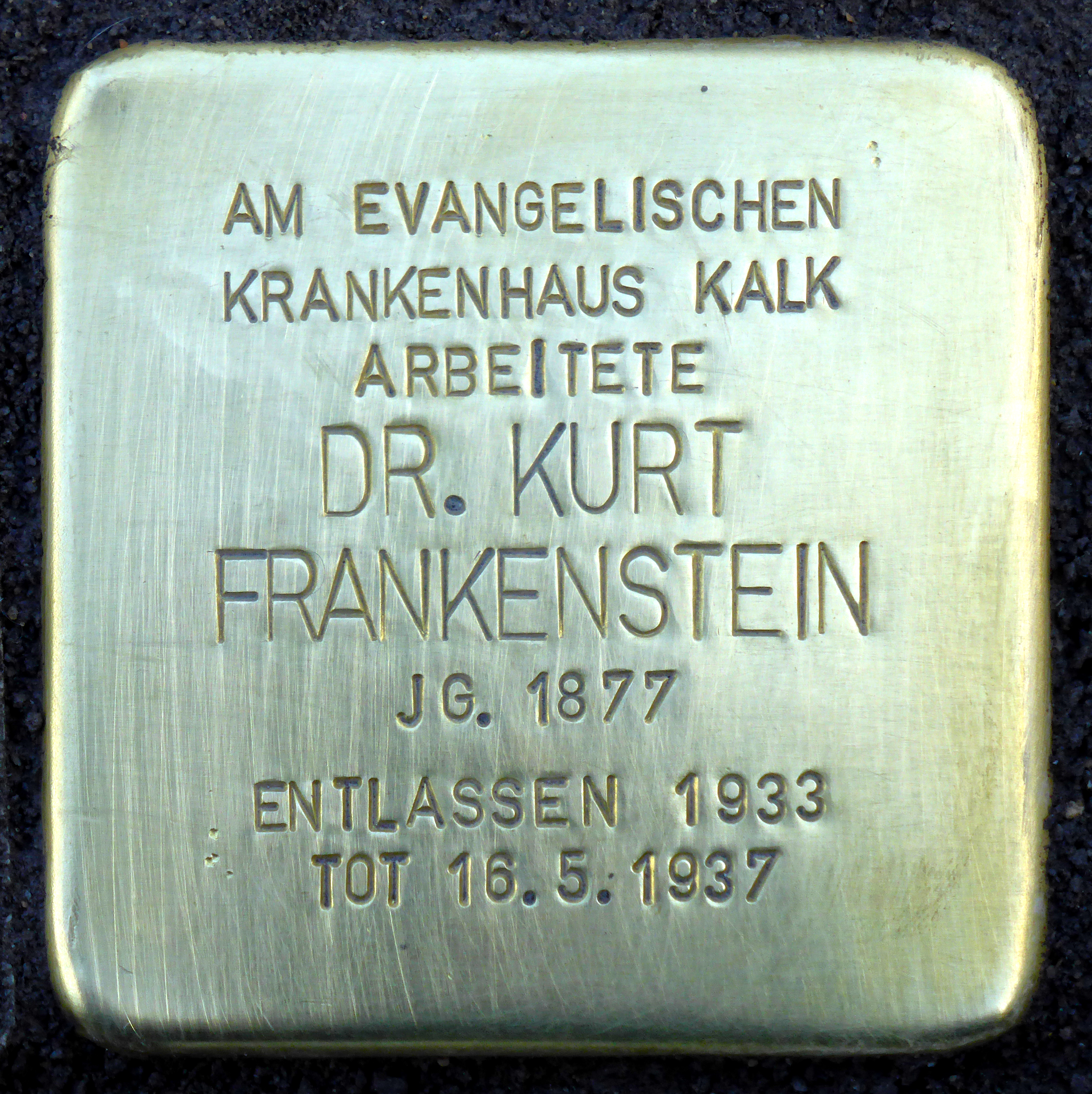 Stolperstein: Dr. Kurt Frankenstein (Buchforststraße 2), Köln.